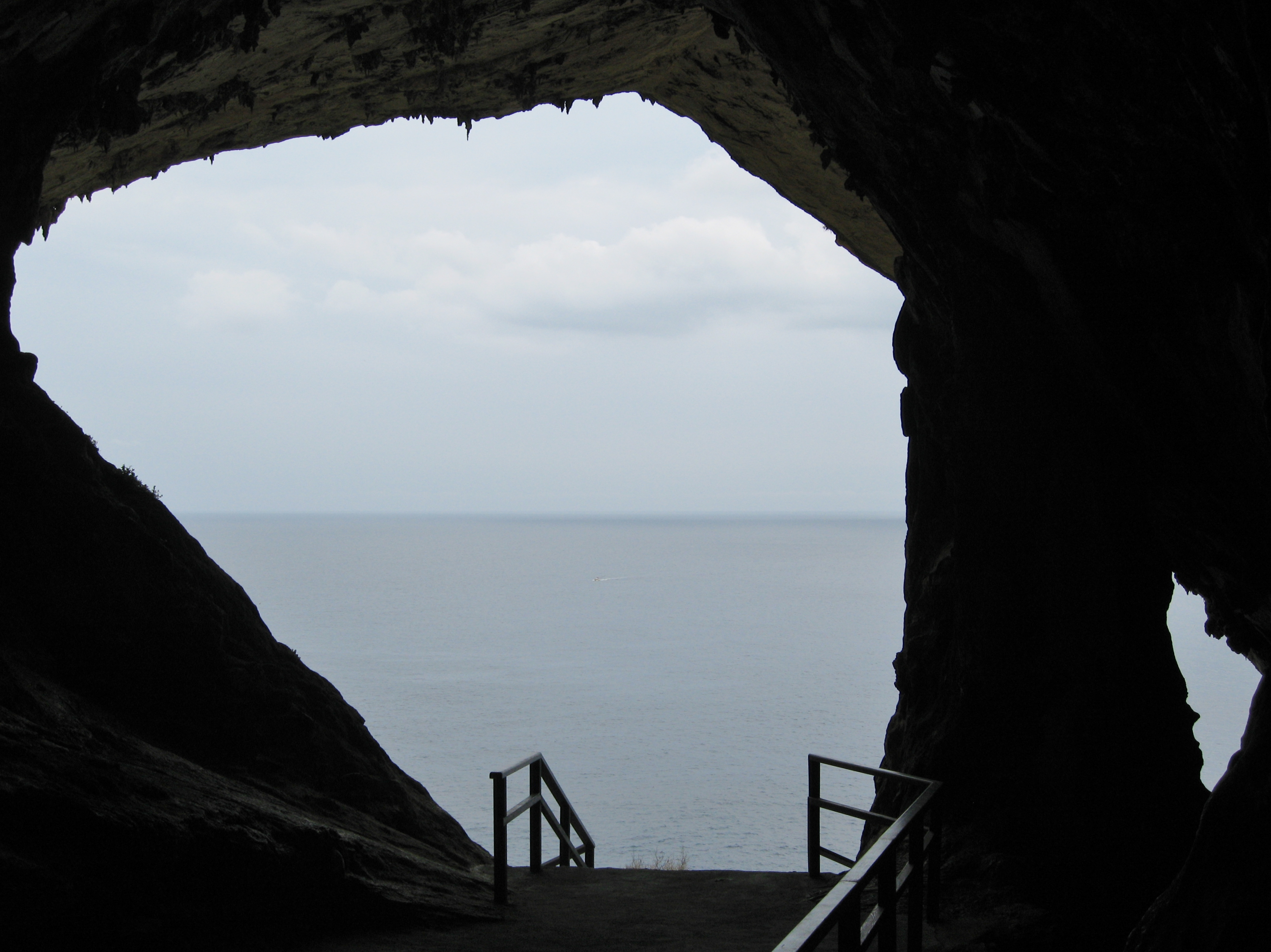 Ausgang der Coves d’Artà, Gemeinde Capdepera, Mallorca, Spanien